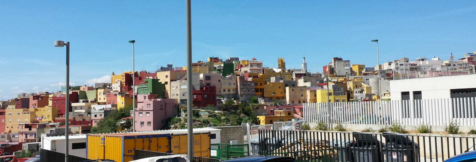 Barrio de El Príncipe, Ceuta, España.